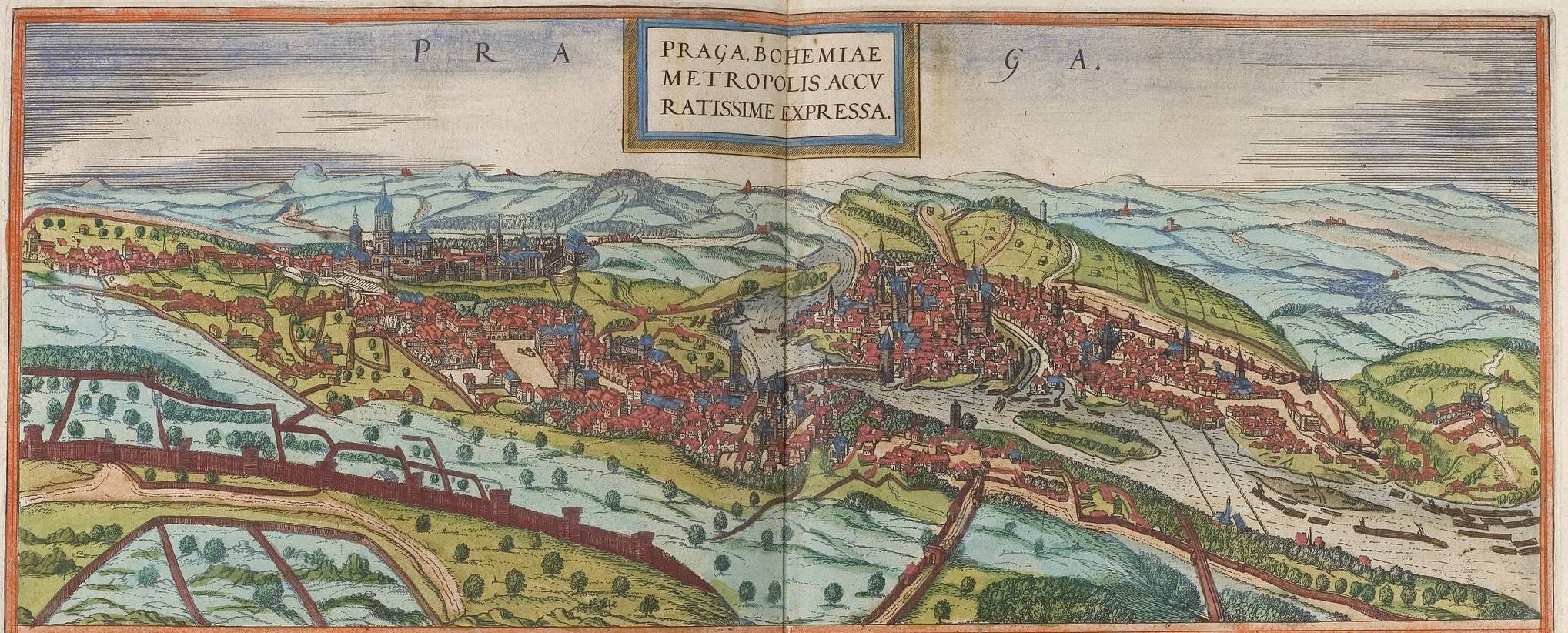 Praha